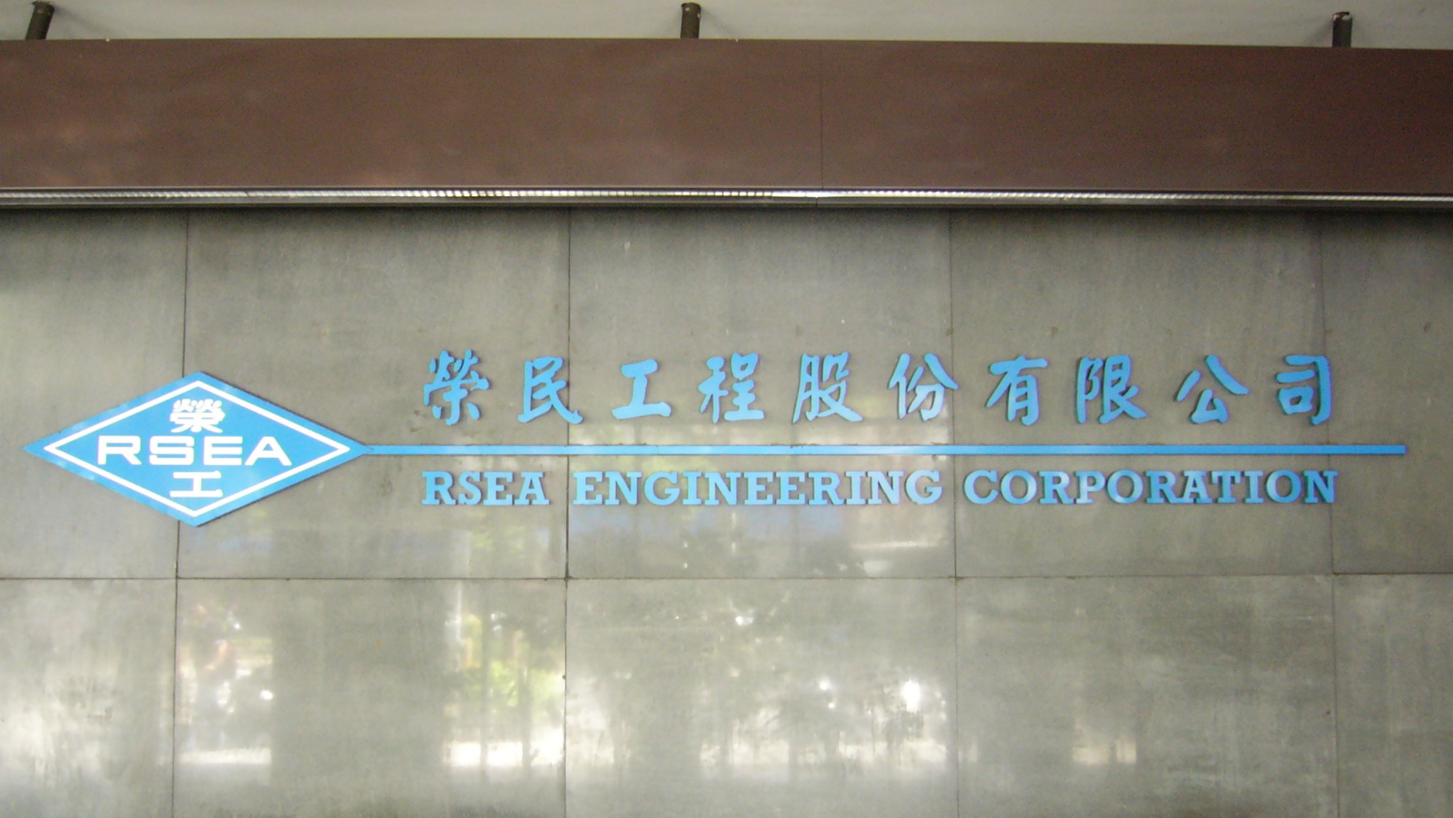 中文（台灣）: 志清大樓一樓大廳牆上的榮民工程公司商標。